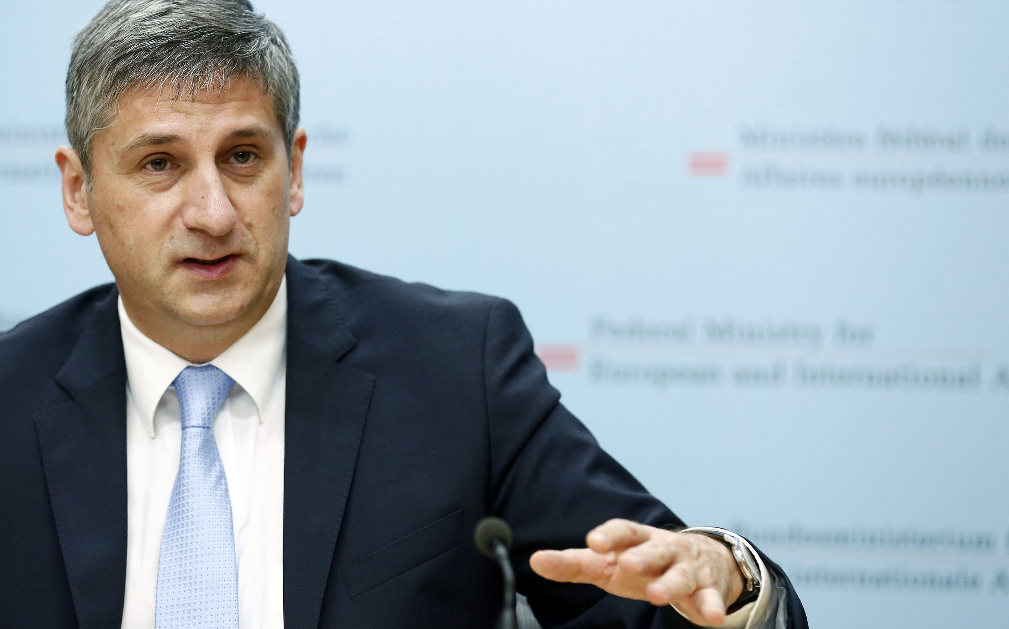 Vizekanzler Michael Spindelegger hält gemeinsam mit Bundesminister Nikolaus Berlakovich eine Pressekonferenz zum Thema "Allianz fürs Land". Außenministerium, Wien, 07.03.2013, Foto: Dragan Tatic